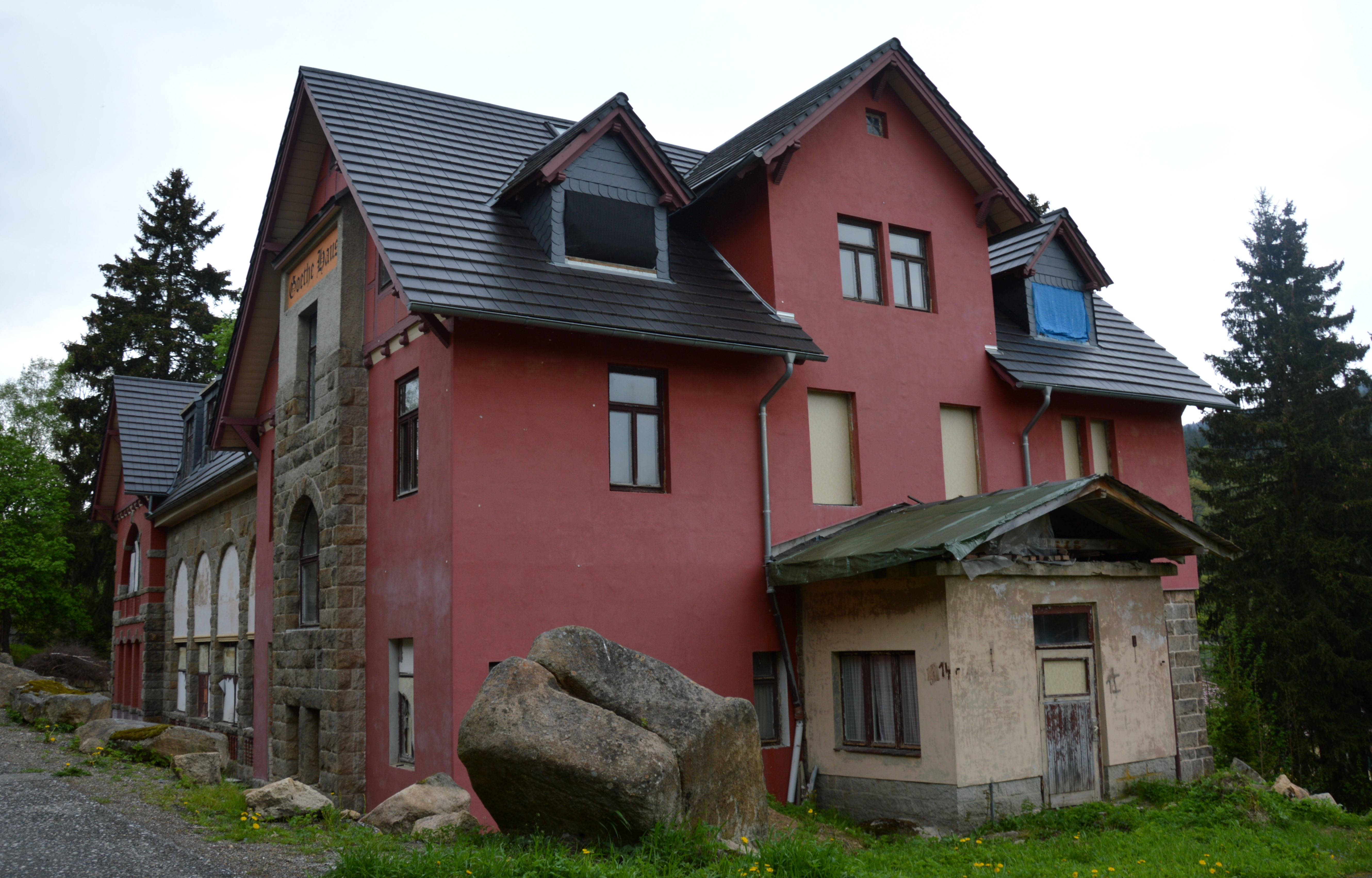 Barenberg 14 in Schierke